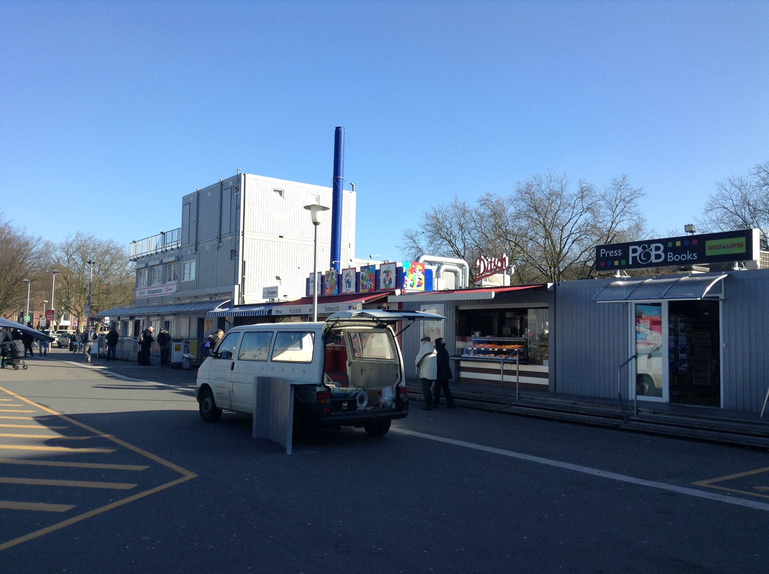 Münster (Westfalen) Hauptbahnhof, Containerdorf am Bremer Platz, 25. Februar 2016